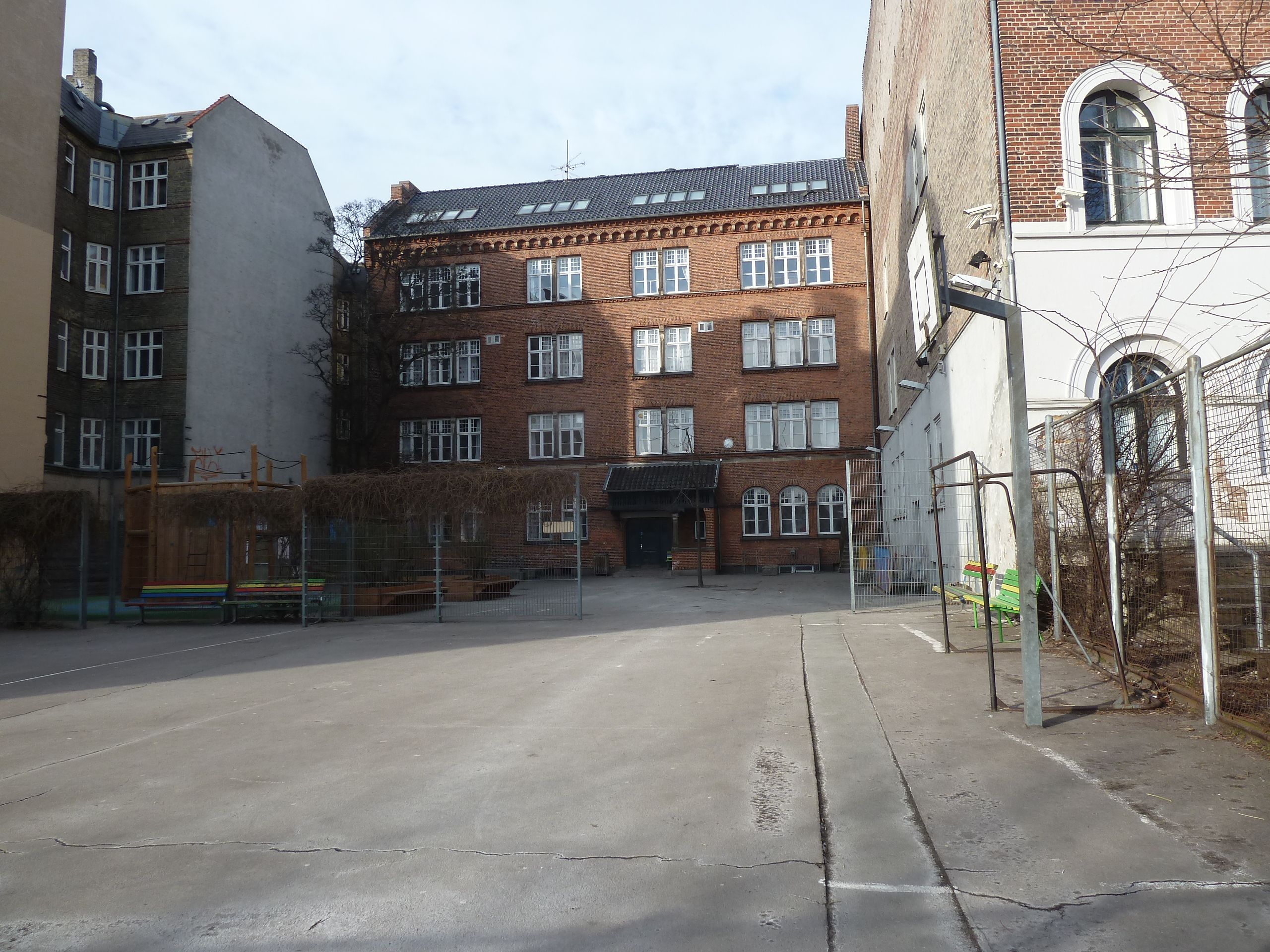 The school Sortedamskolen in Østerbro in Copenhagen.